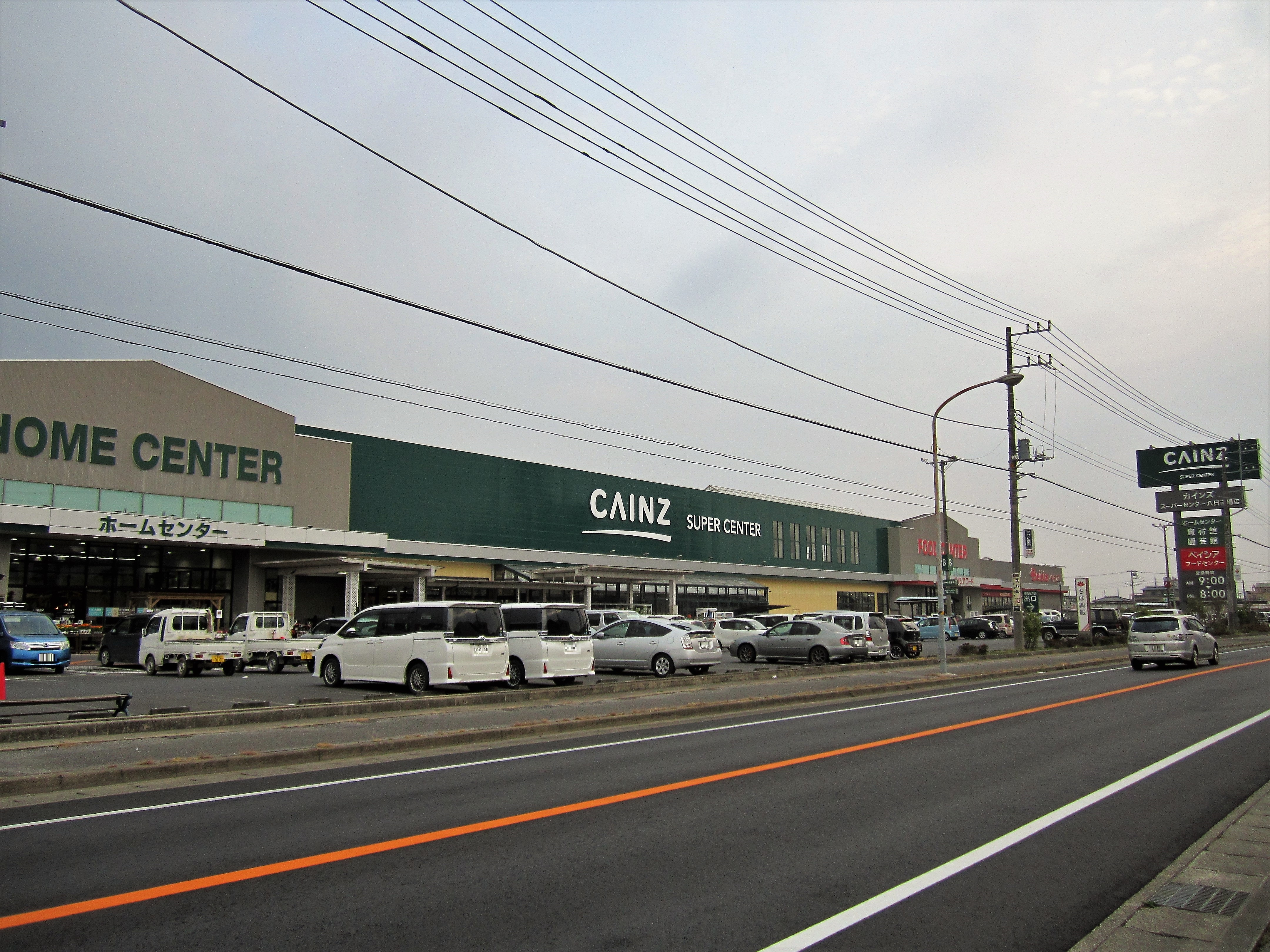 カインズスーパーセンター八日市場店・ベイシアフードセンター八日市場店（匝瑳市八日市場ロ字横田） Canon PowerShot A2200